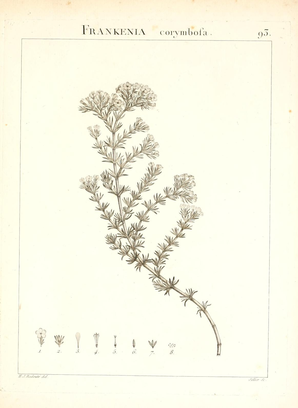 Fll A N KKNI A c or^nilK) fa 'ii'*, .1 4 9^ JZ.J./i^,/ruA-.A/. ,il-//„..